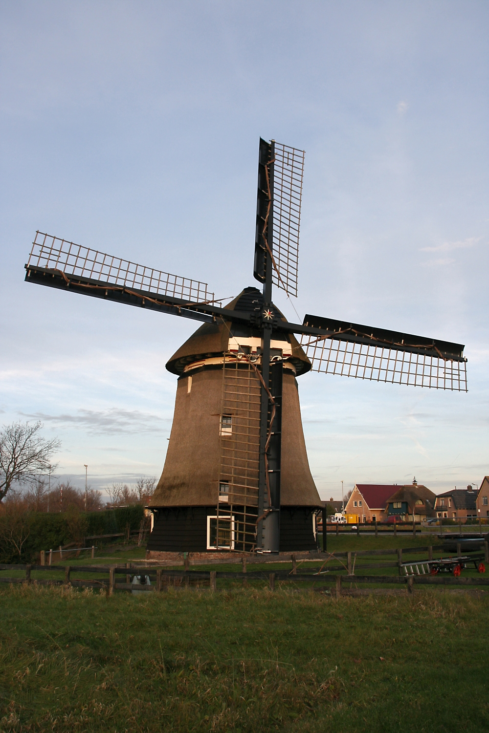 Koedijk: de Sluismolen in de namiddagzon